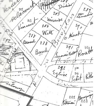 Détail du plan du Mégrine Urbain : emplacement de l'église Sainte-Thérèse de l'Enfant-Jésus de Mégrine-Coteaux